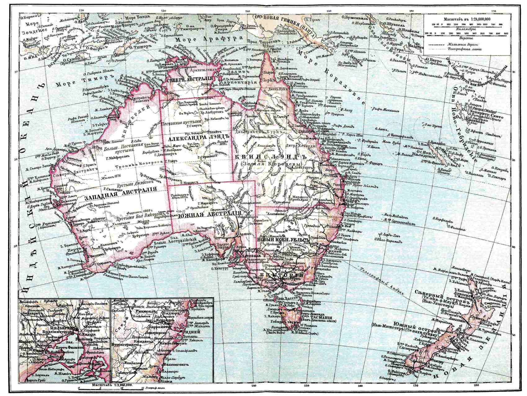 Карта Австралии из энциклопедии Брокгауза и Ефрона